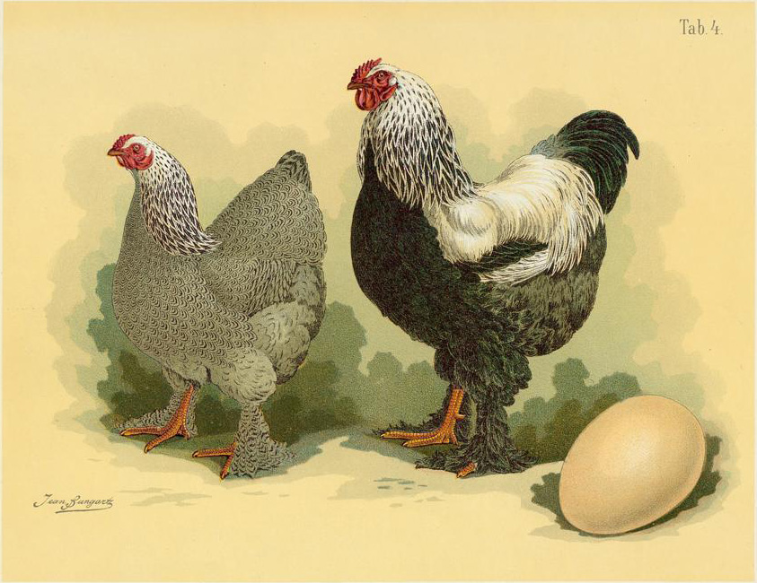 Brahmapoutra-Huhn. Gallus dom. gigant. crenulato-pectin. Brahma Pootra-fowl. Brahma-Pootra.